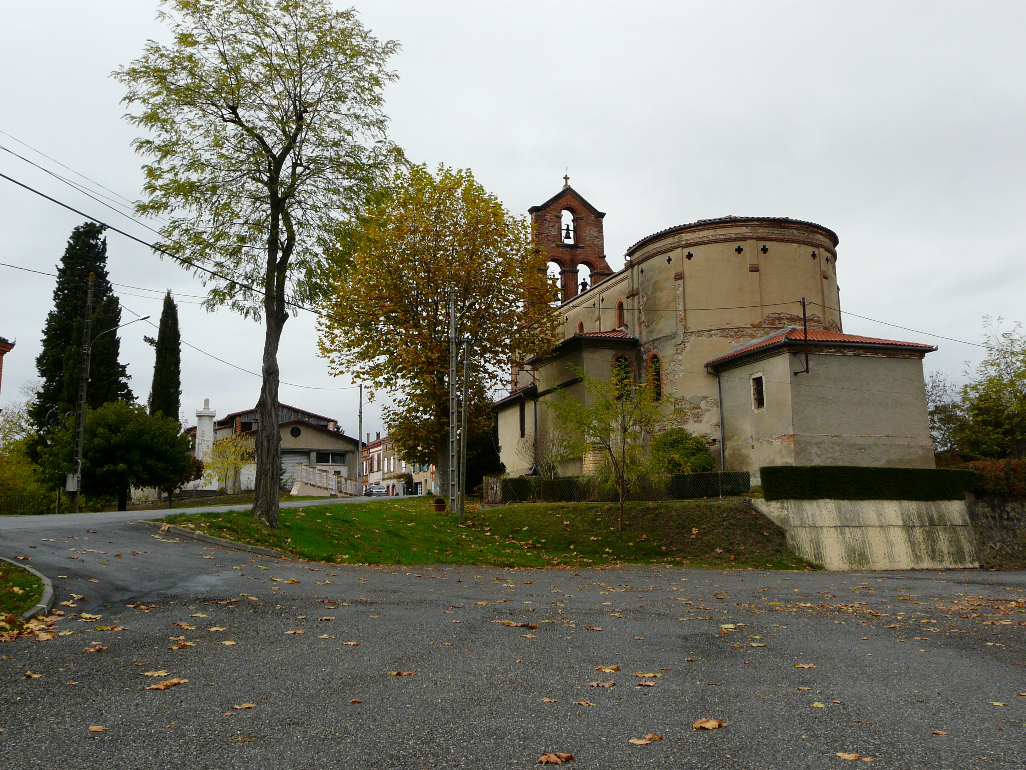 Église de Latrape